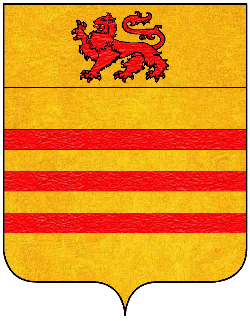 Stemma della famiglia Asmundo